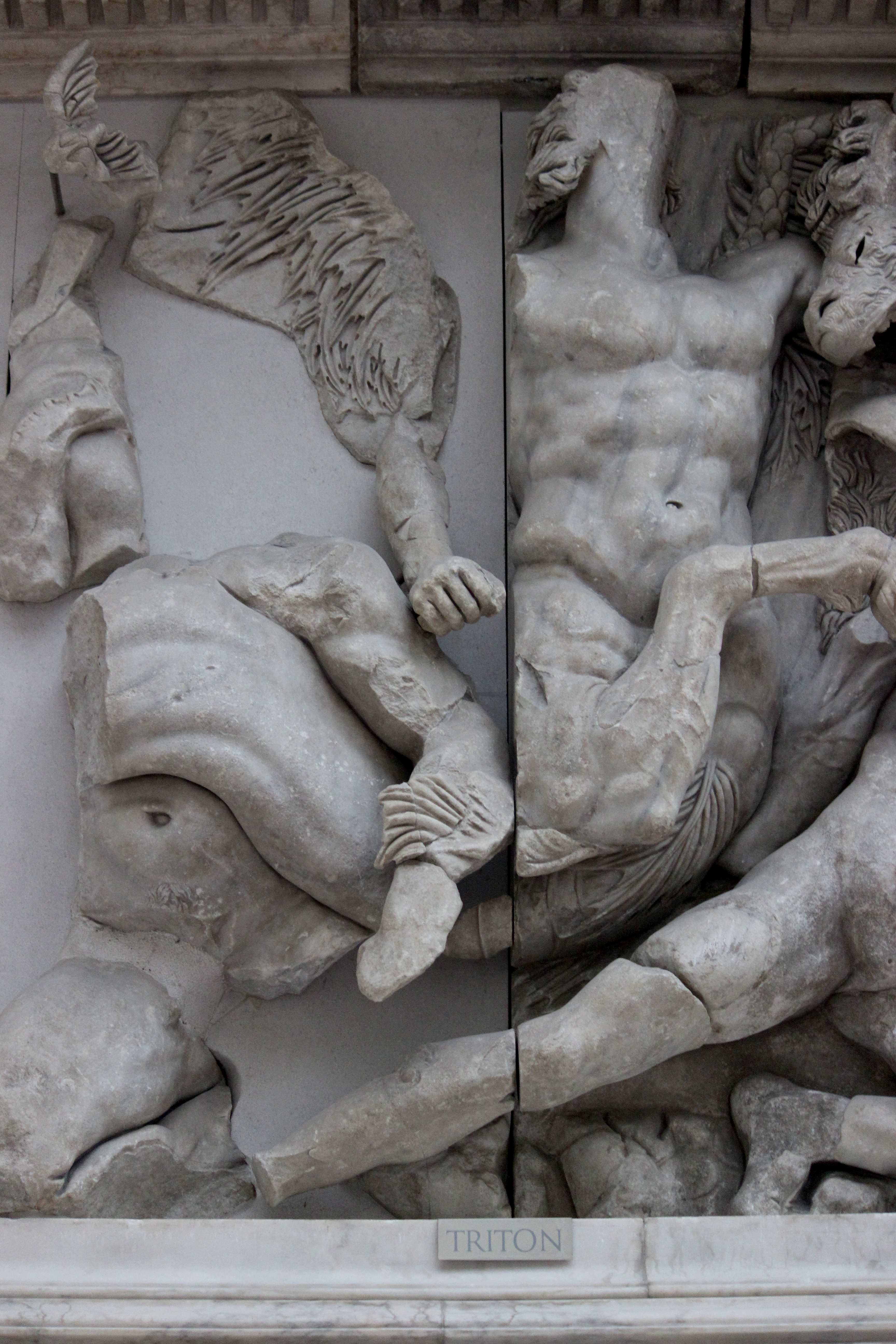 Tritón lucha contra los gigantes. Altar de Pérgamo.